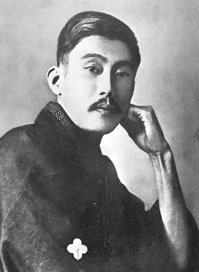 Portrait of Ozaki Koyo (尾崎紅葉, 1868 – 1903)